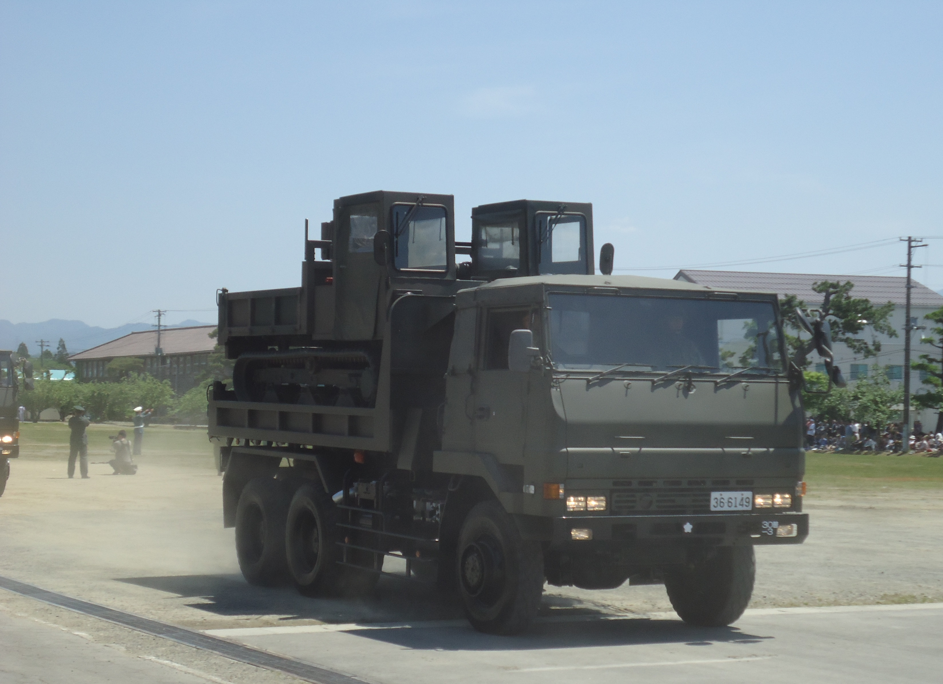 2015年陸上自衛隊新発田駐屯地開放の際、73式大型トラックに積載される資材運搬車を撮影したもの